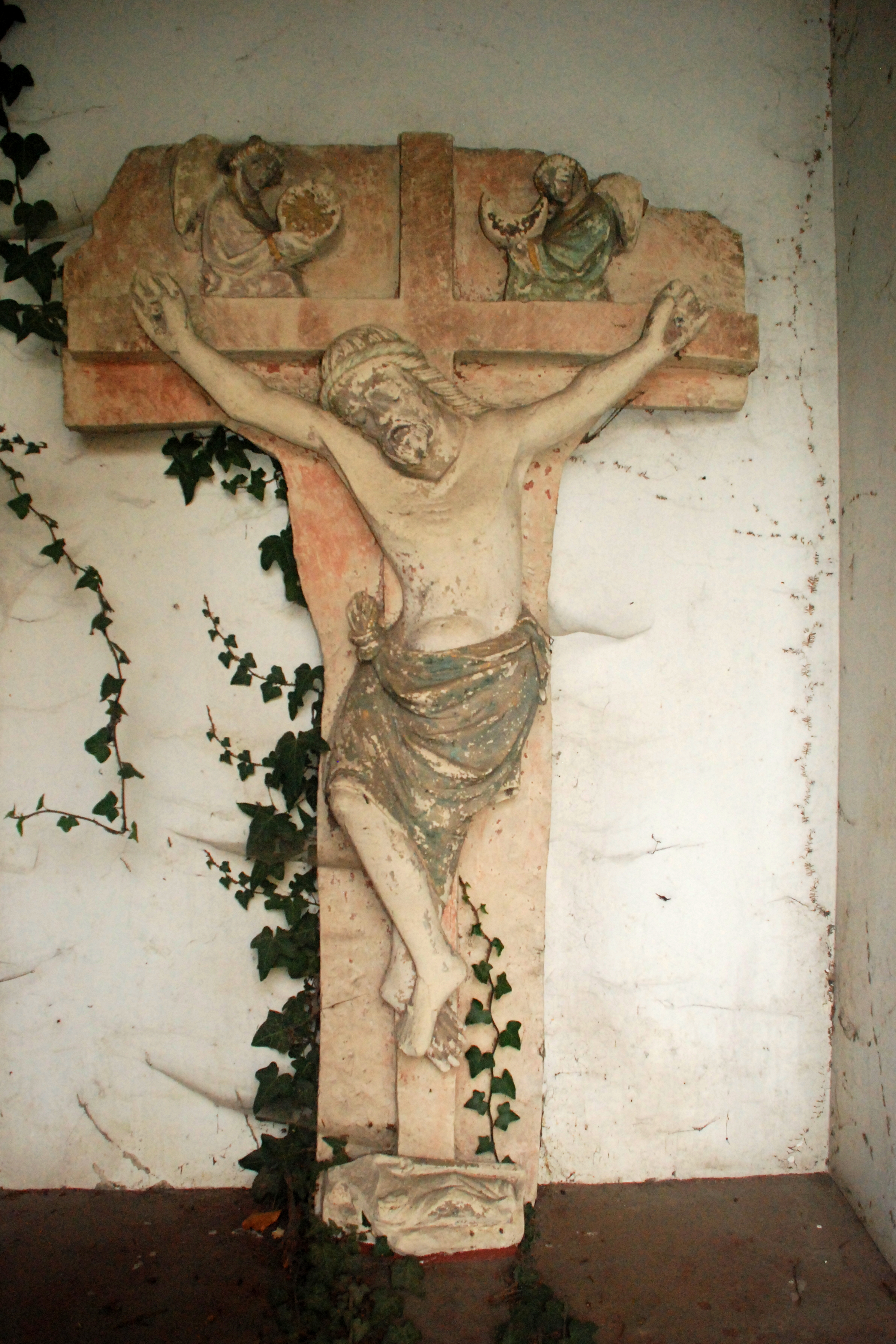 Belgique - Brabant wallon - Ottignies - Église Notre-Dame de Mousty - Christ extérieur